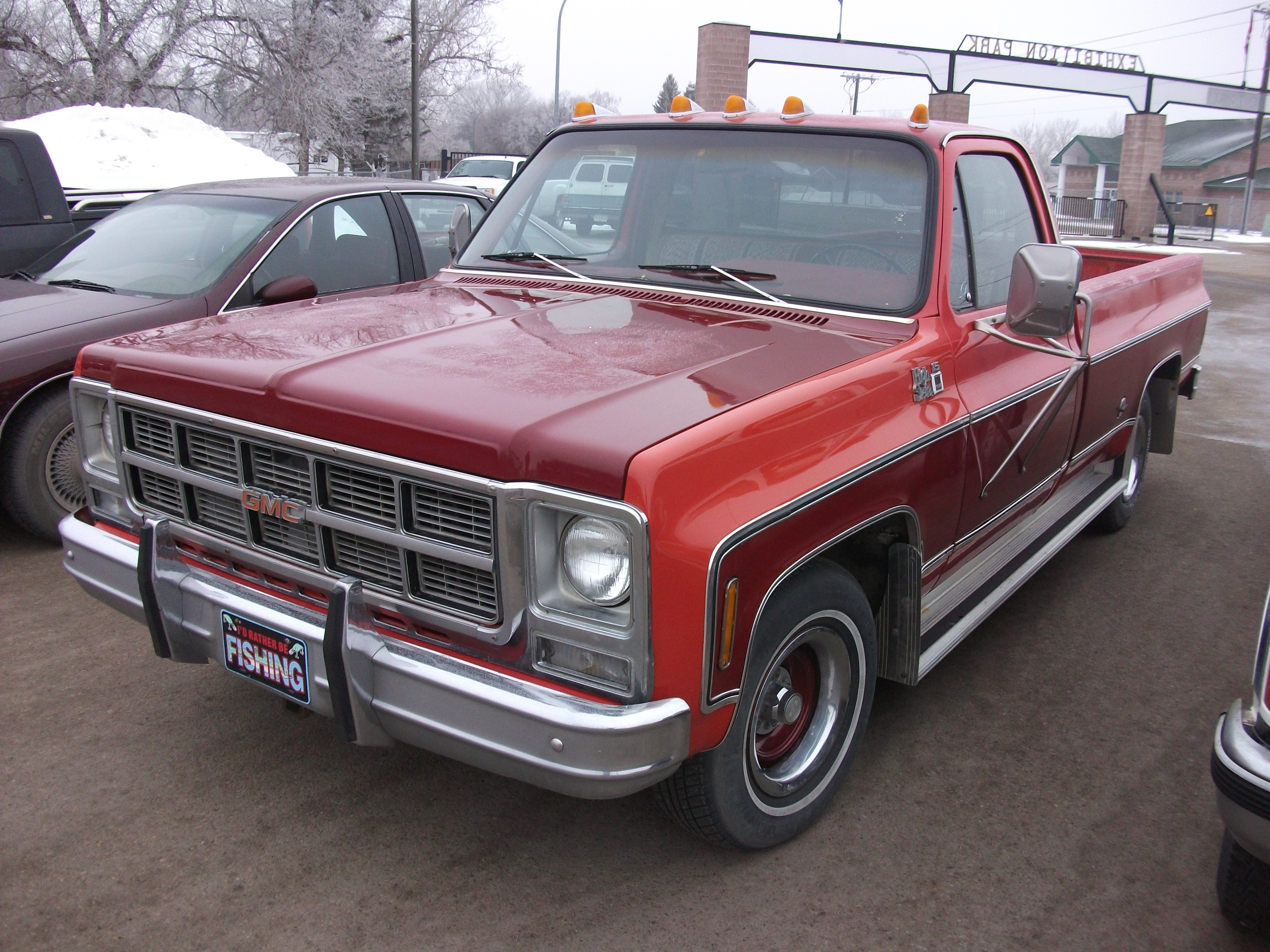 GMC High Sierra